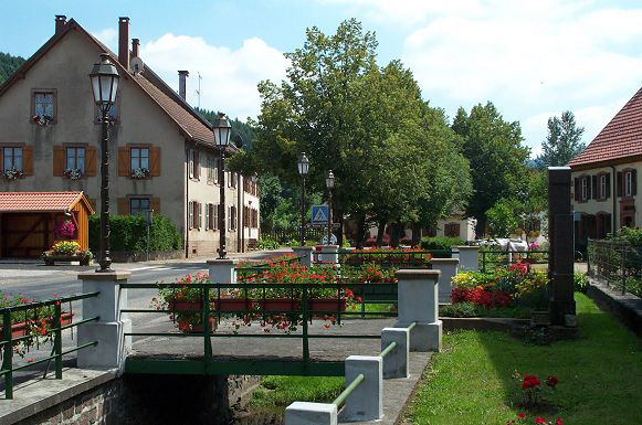 Petite rivère qui traverse la ville (la bruche ?)